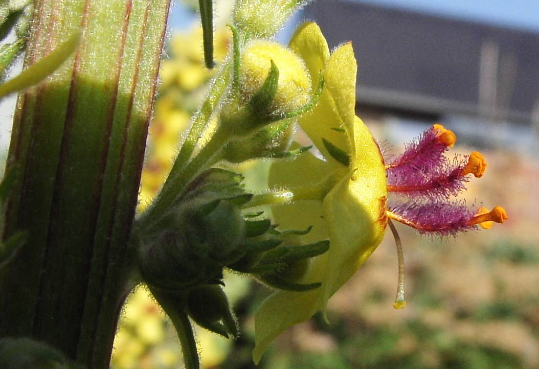 Verbascum nigrum in a garden in Nettersheim, Germany; Closeup of flower and stem.